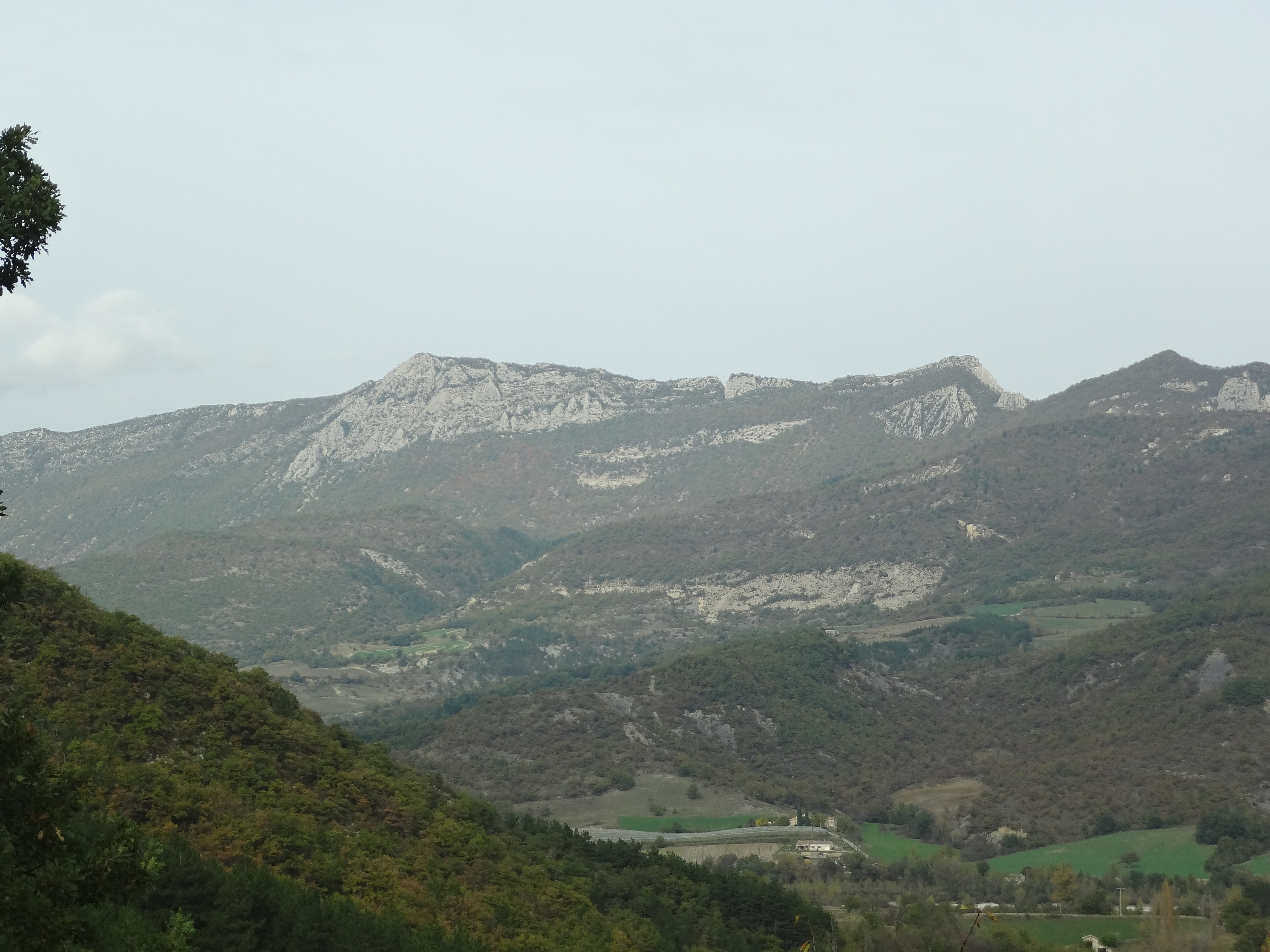 Roc de l'Aigle et Rocher du Loup (Noyers-sur-Jabron) pris de Valbelle